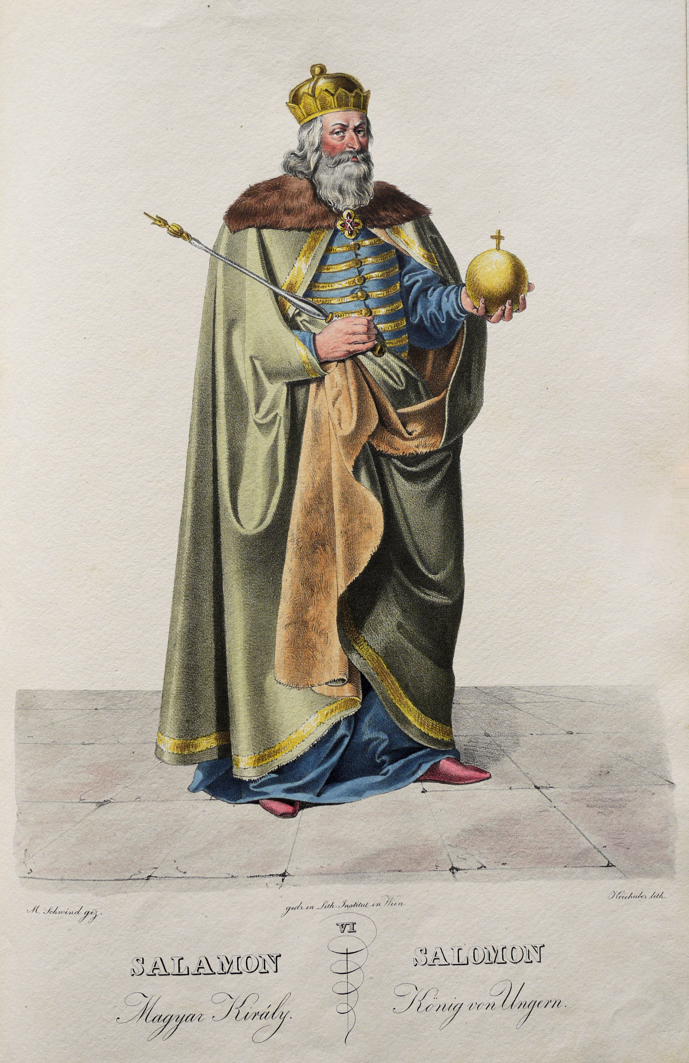 Salomon (1053-1087), König von Ungarn. Lithographie von Josef Kriehuber nach einer Zeichnung von Moritz von Schwind aus Ungerns Erste Heerführer Herzoge und Koenige In einer Reihe von Bildnissen von Bela bis auf Seine Majestät Franz I. Kaiser Von Österreich König Von Ungern &c., &c. Wien : Lithographisches Institut ;ca. 1828